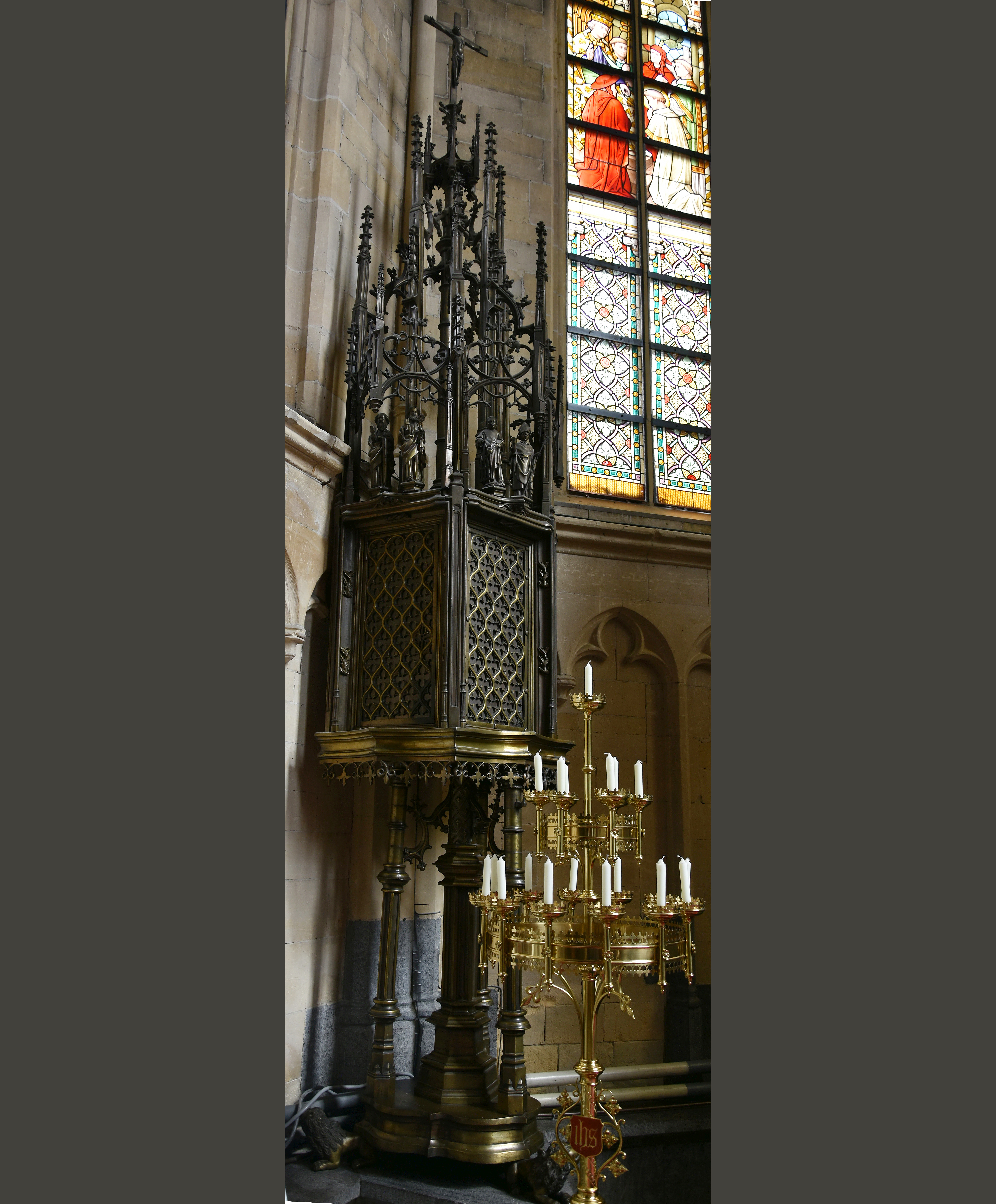 Aert van Tricht (actief 1492-1501) Sacramentstoren (messing ca.1500) Sint-Laurentiuskerk (Bocholt) 8-09-2019 This photo of movable heritage has been taken in the Flemish Region